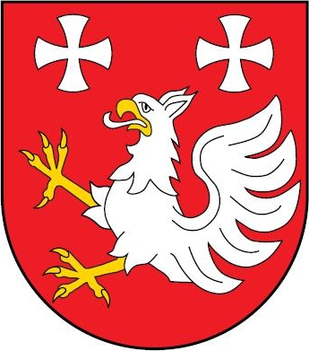 Herb gminy Łużna